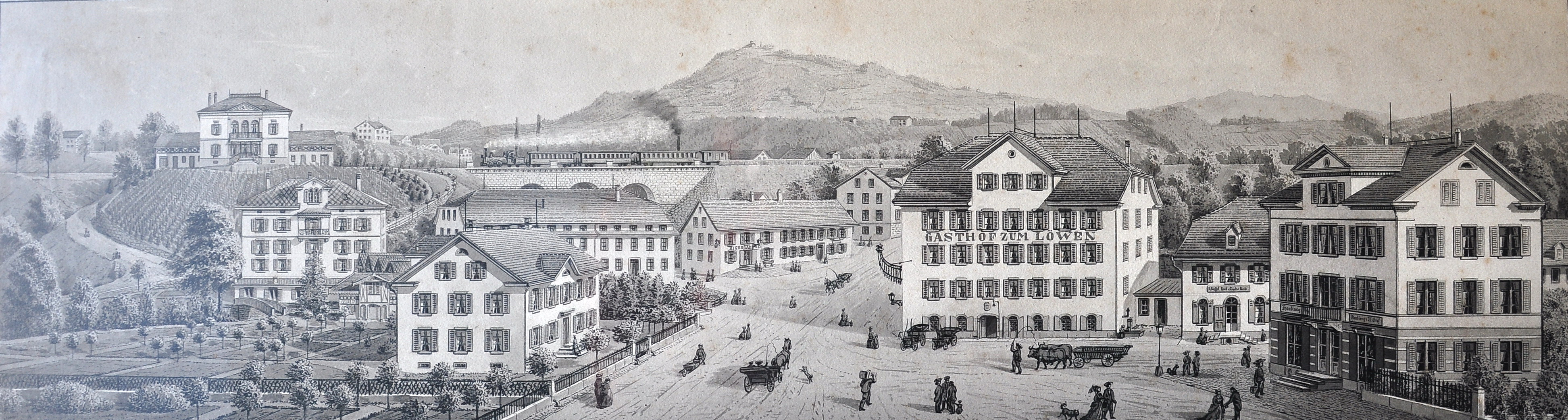 Rüti (ZH) : Der Löwenplatz auf einer Zeichnung, Datum nicht spezifiziert, wahrscheinlich wird aber der Anschluss Rütis an die Bahnstrecke Zürich–Uster–Rapperswil im Jahr 1859 dargestellt.